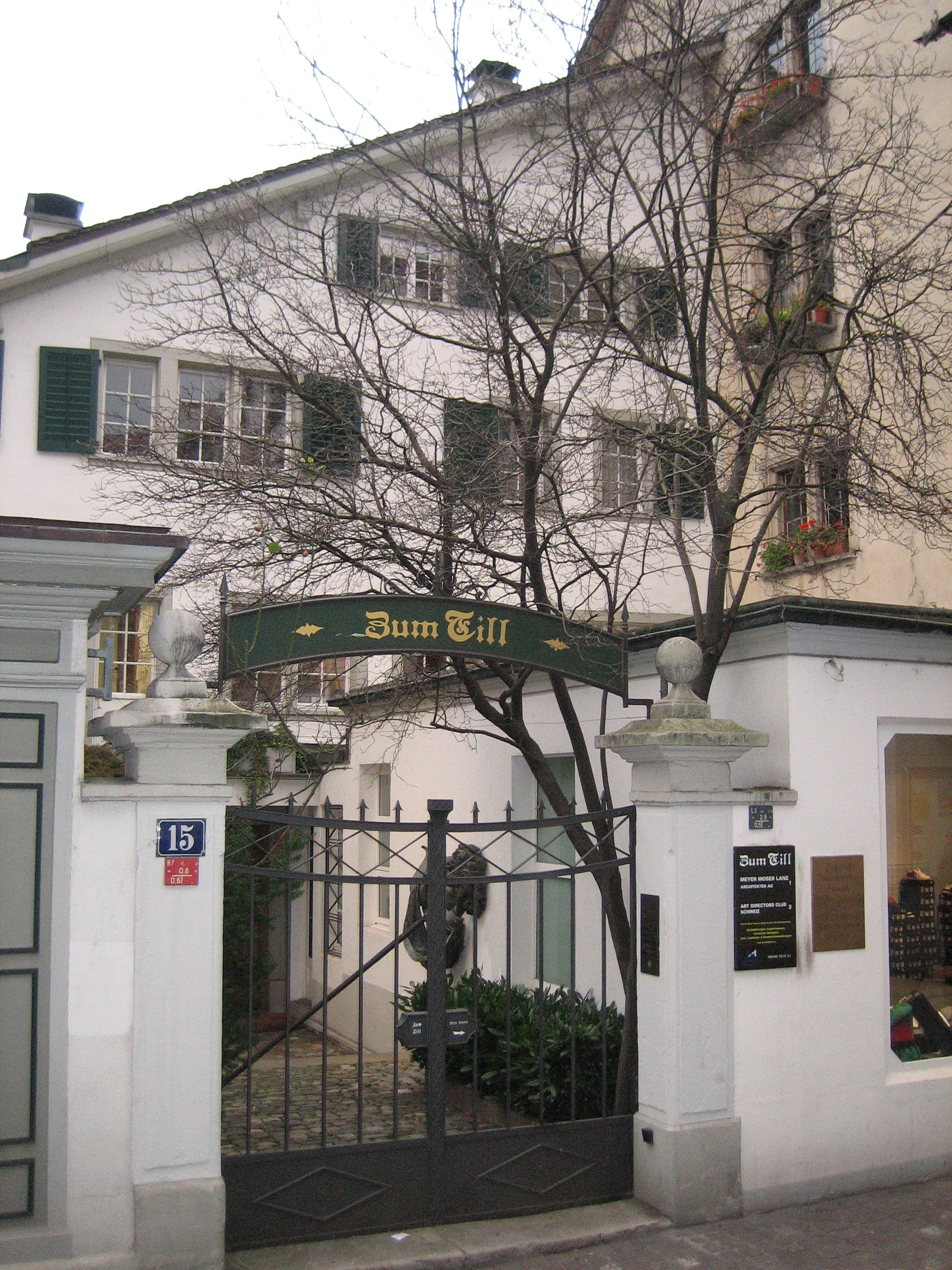 Geburtshaus des Malers Karl Bodmer